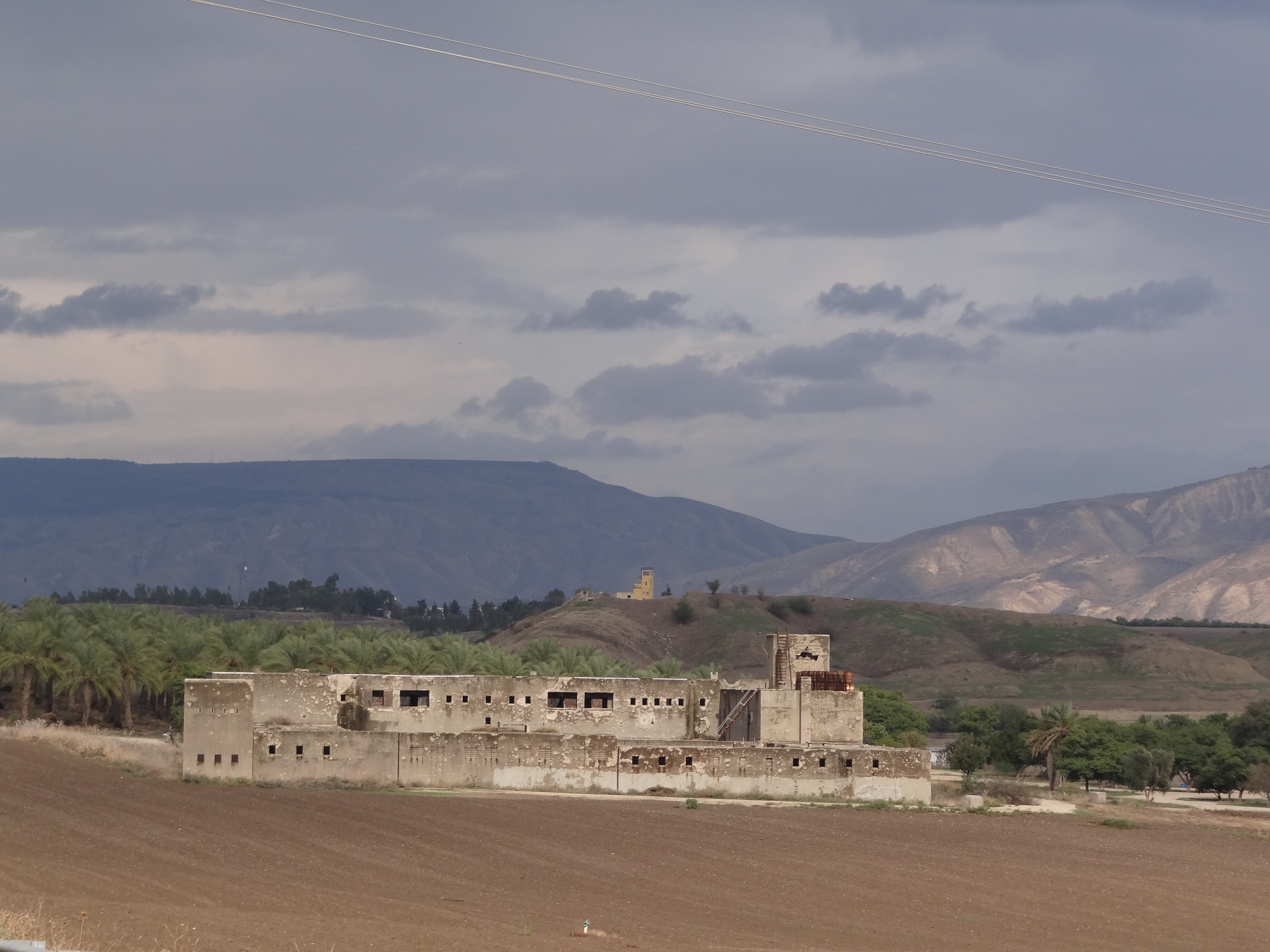 Old British police station from 1948 near kibbutz Gesher המבנה ההיסטורי של משטרת גשר ששוכן ליד חצר גשר הישנה